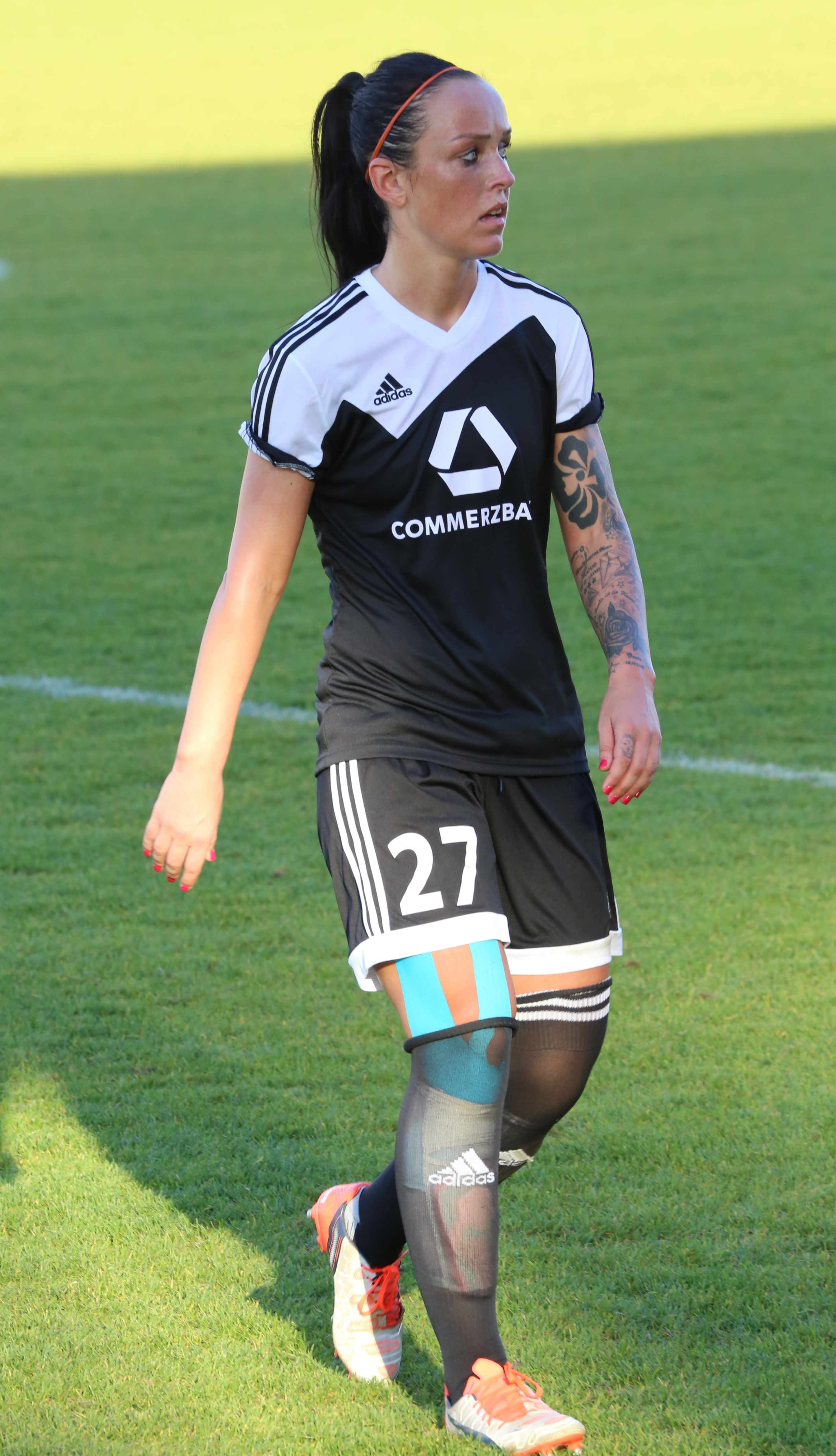 Peggy Kuznik (1. FFC Frankfurt) im DFB-Pokal-Achtelfinale zwischen FC Bayern München und 1. FFC Frankfurt, Ergebnis 2:0, Stadion an der Grünwalder Straße